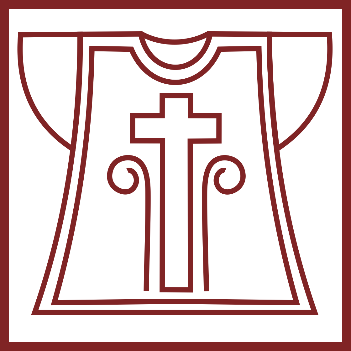 Logo inštitútu Heraldického konzultora Konferencie biskupov Slovenska